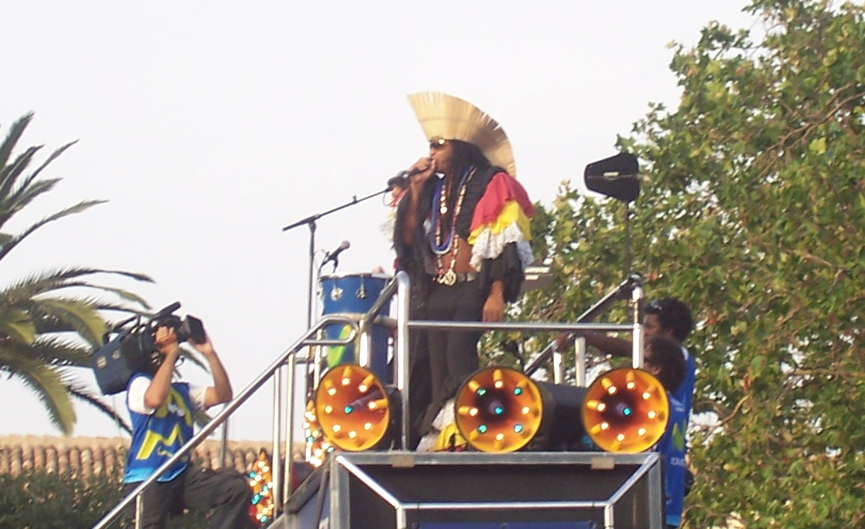 Carlinhos Brown a Valencia prima del suo Carnevale itinerante